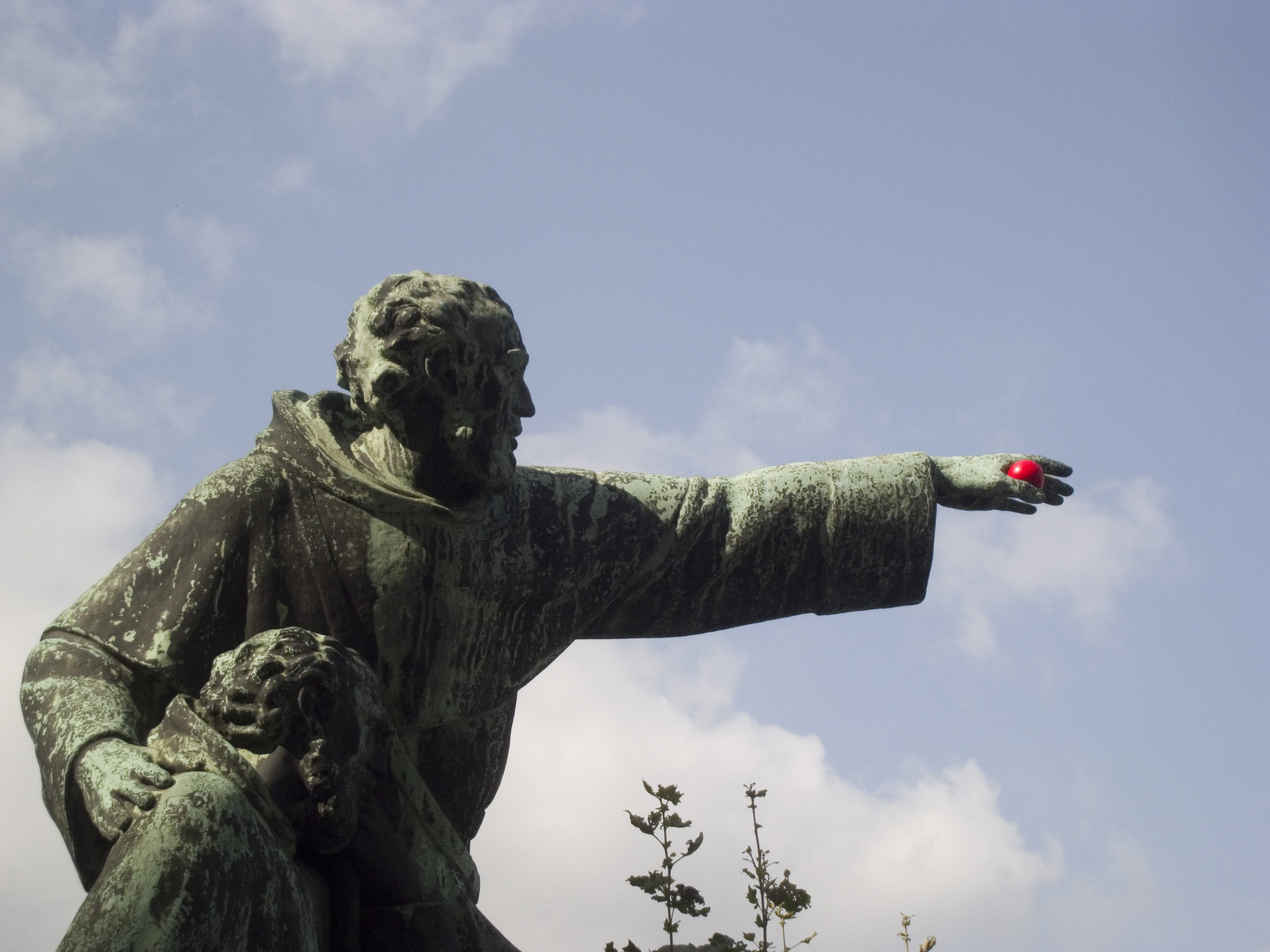 Un détail suffit pour détourner l'attention Cette sculpture évoque les efforts de plusieurs moines dominicains, dépéchés en 1235 par Béla IV pour retrouver la trace des Hongrois restés dans la patrie des ancêtres. Julianus les retrouvera du côté de la Bachkirie, avant leur anéantissement par les troupes mongoles. Du sérieux, du triste, du lourd, donc. Oui, mais voilà : je doute que la boule rouge dans la main de Gerhardus soit d'origine et je ne vois plus qu'elle.